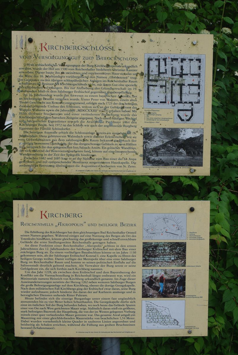 Hinweisschilder Kirchberg-Schlössl und ehem. Burg Kirchberg an der Thumseestraße in 83435 Bad Reichenhall